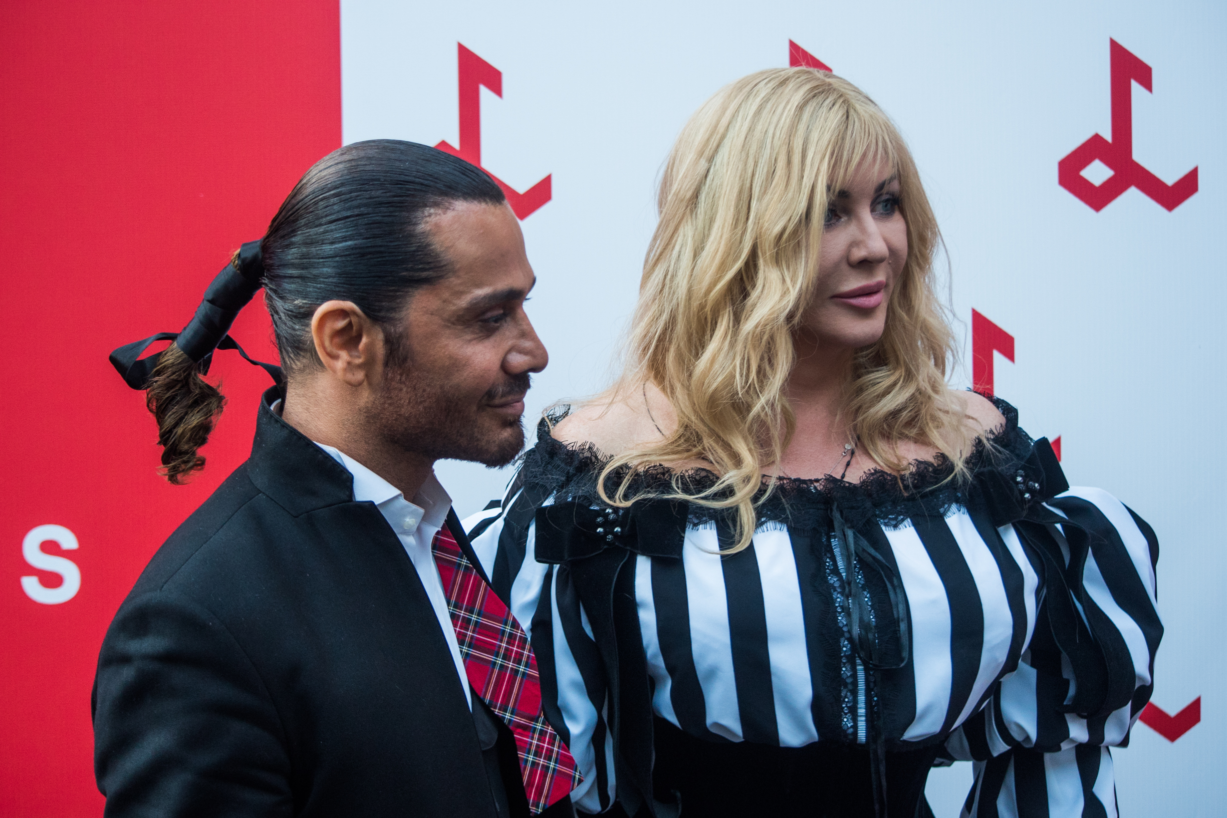 Аслан Ахмадов и Ирина Билык на фестивале «Лайма. Рандеву. Юрмала 2017»